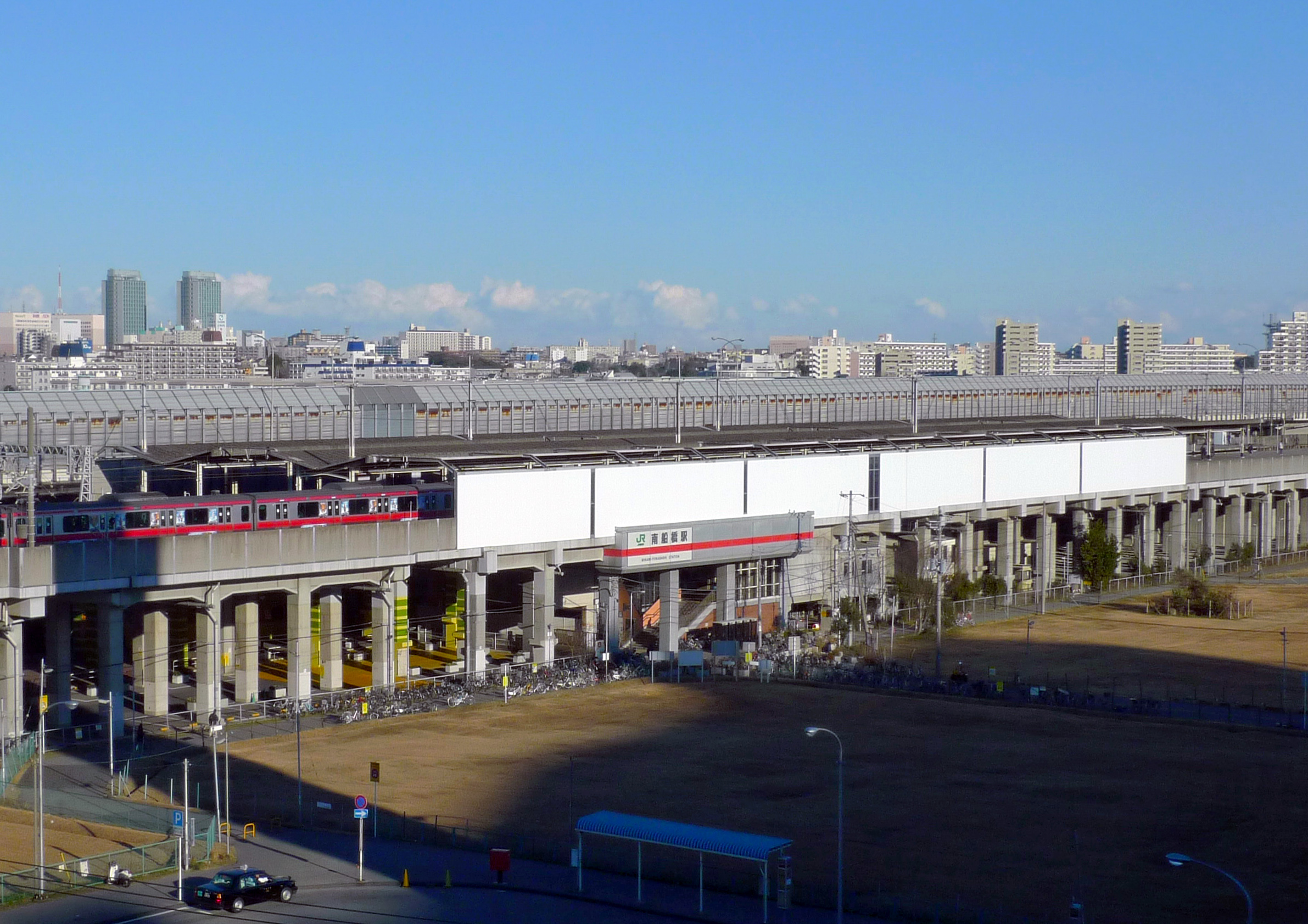 IKEA船橋から望む南船橋駅